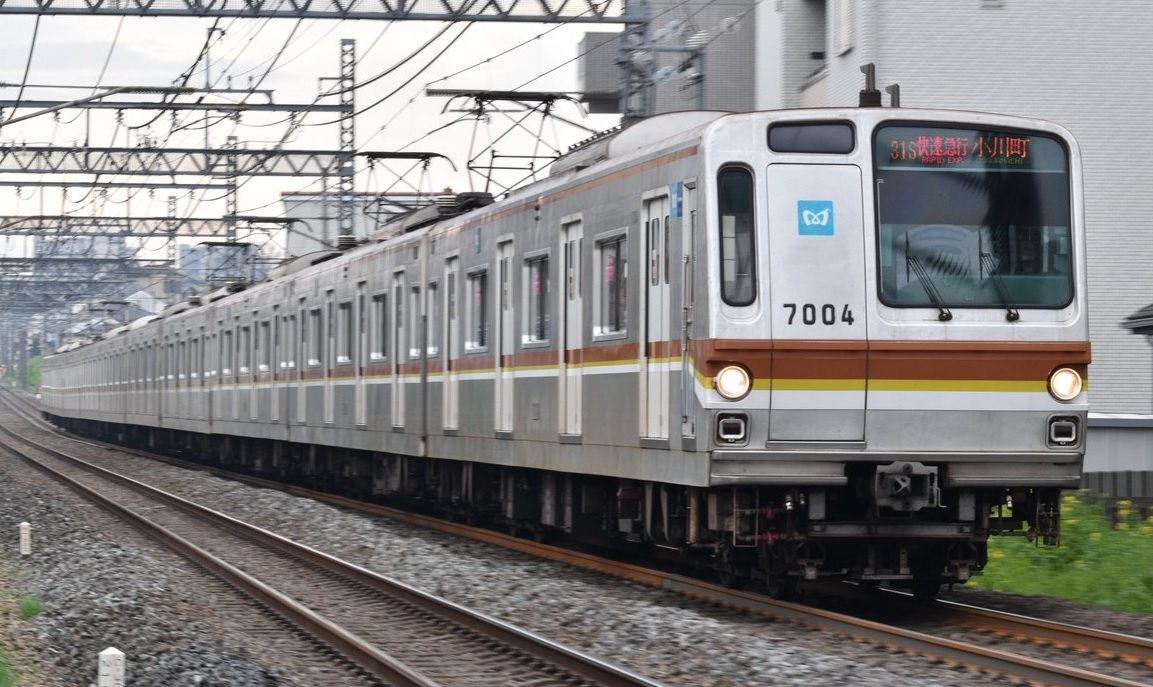 東京メトロ7000系7104F 快速急行小川町行き